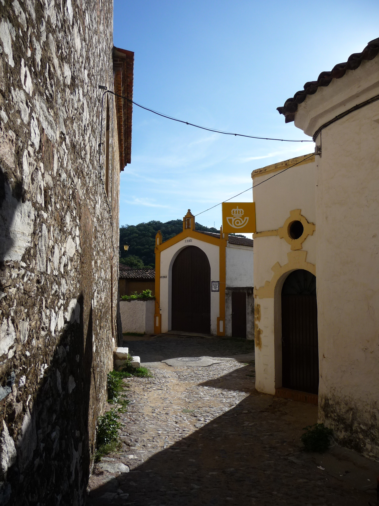 Alajar-P1040687.JPG